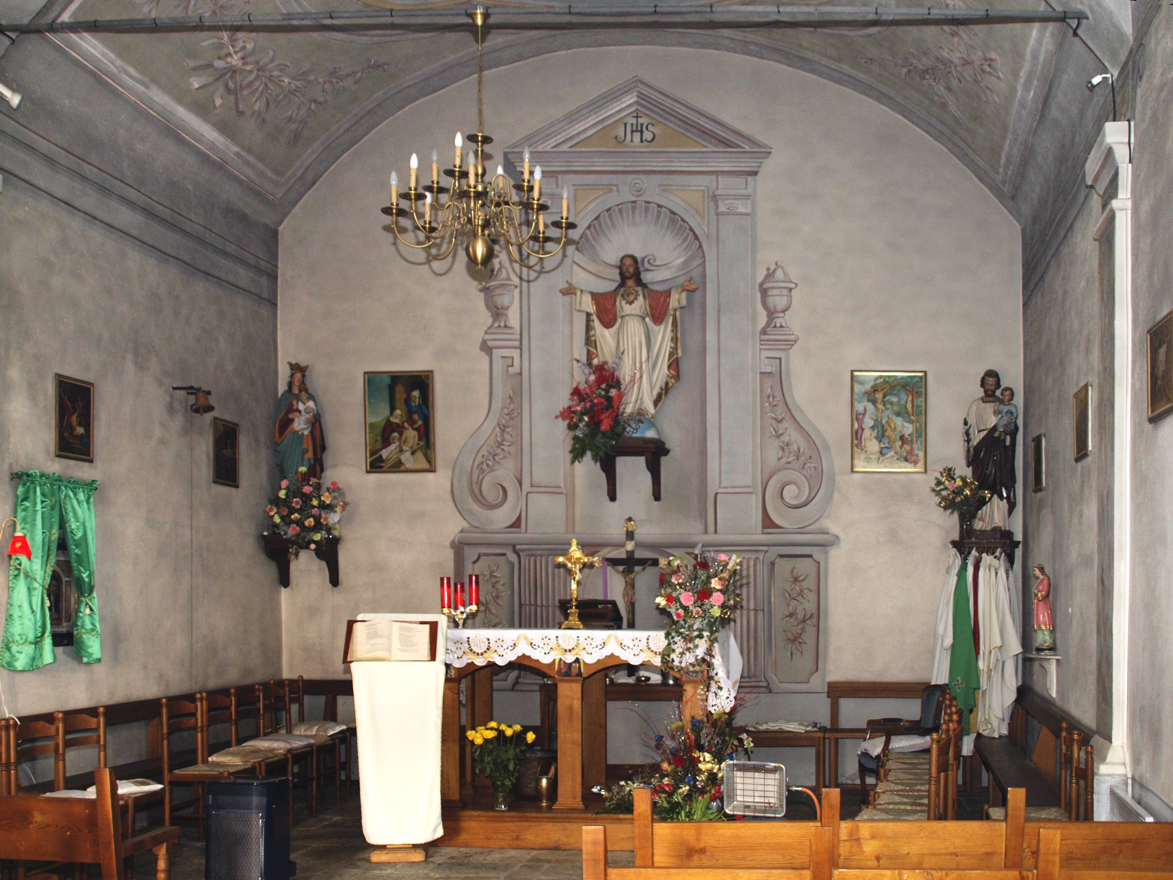 Morosaglia (Corsica) - Intérieur de la chapelle du Sacré-Cœur à Ponte-Leccia